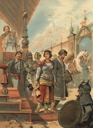 Ставр Годинович. «Распрощались они с князем, уехали в землю Литовскую…». Ил. к … О. Роговой (Шмидт-Москвитиновой) «Русские богатыри. Избранные былины в пересказе для детей». 1898.